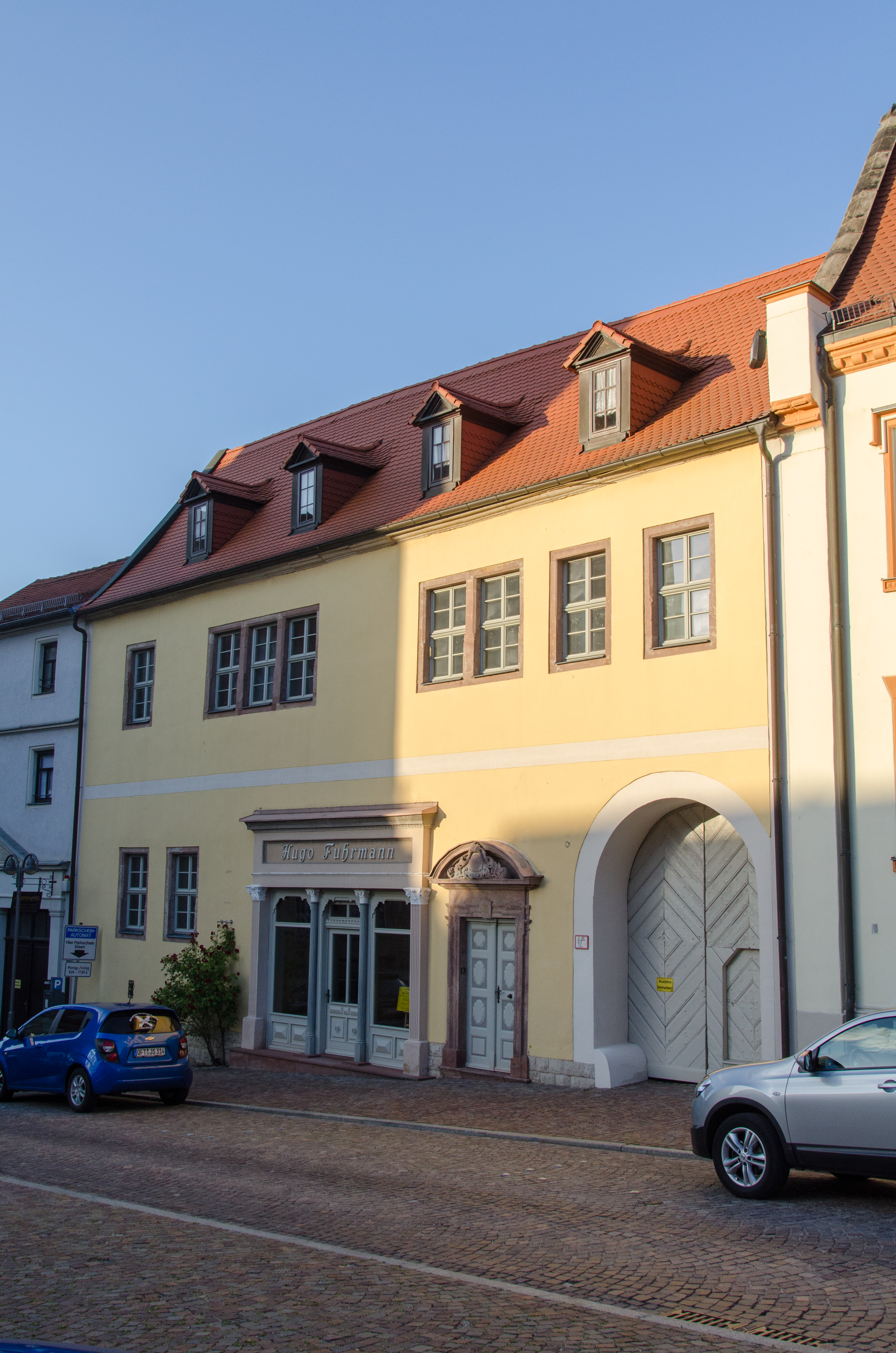 Querfurt, Markt 14